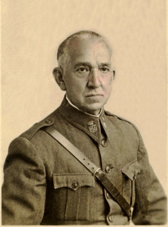 José Aranguren Roldán (Q9013665)